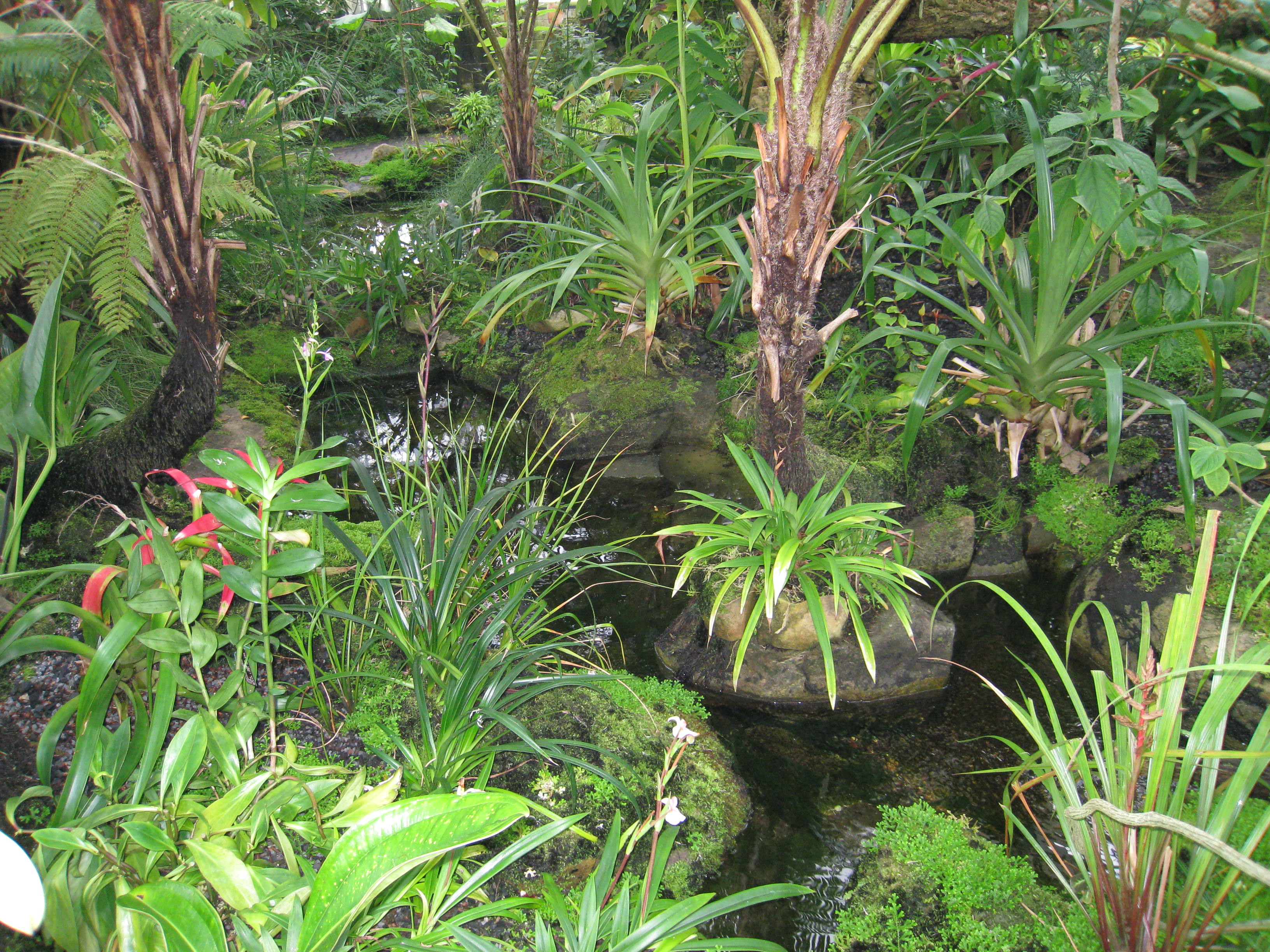 Indoor view, Atlanta Botanical Garden, Atlanta, Georgia, USA.